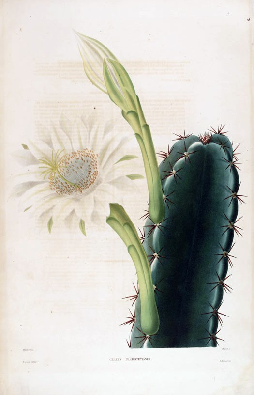 Cereus hexagonus (L.) Mill.